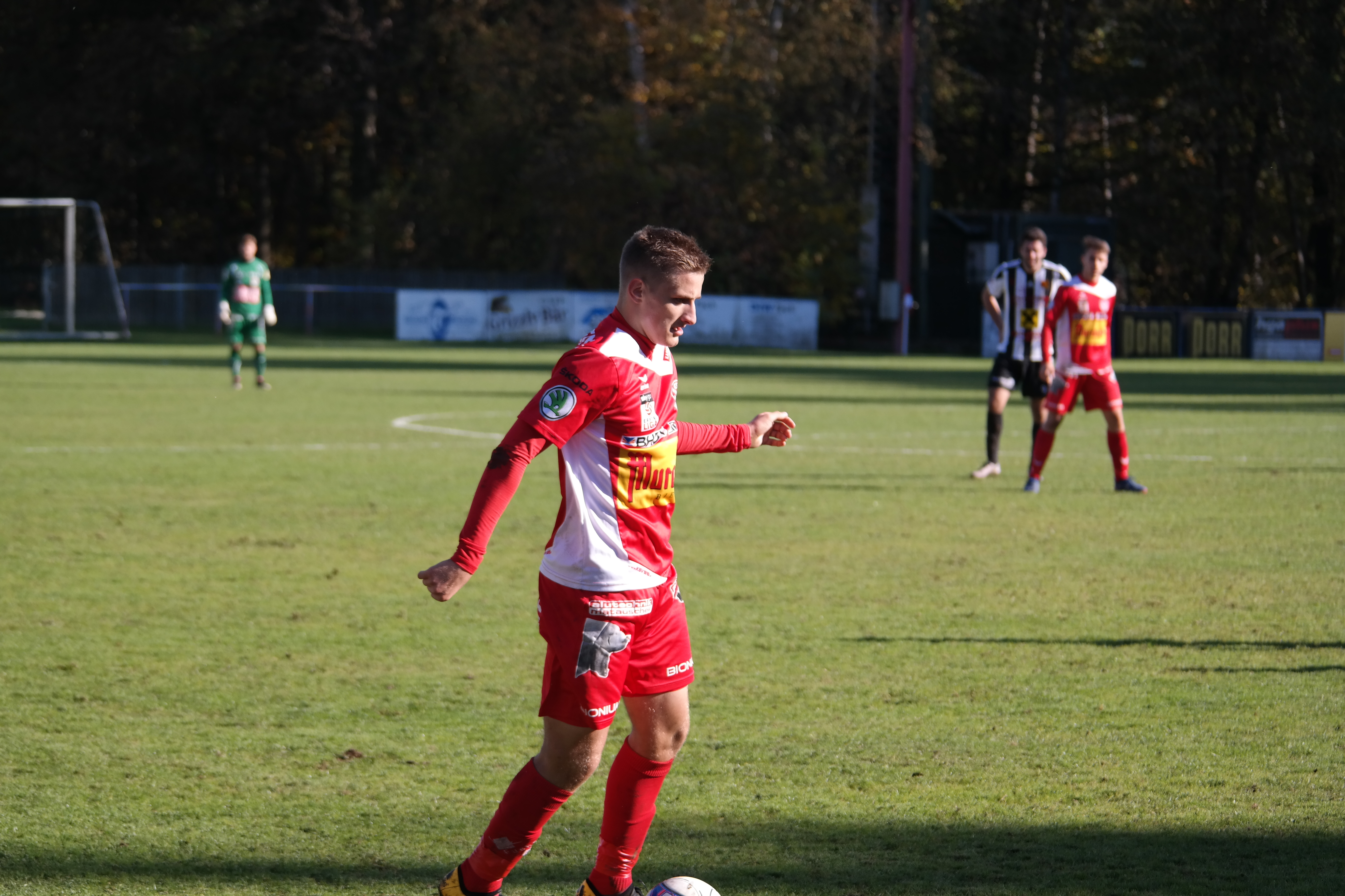 Kapfenberger SV II vs SC Fürstenfeld